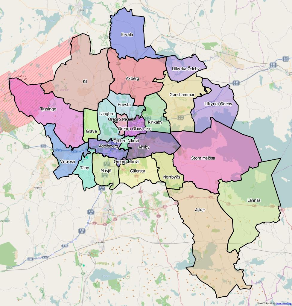 Distriktsindelningen i Örebro kommun World file 127.01692573052856972 0 0 -127.01692573052856972 1639427.05248532444238663 8297506.77059472259134054